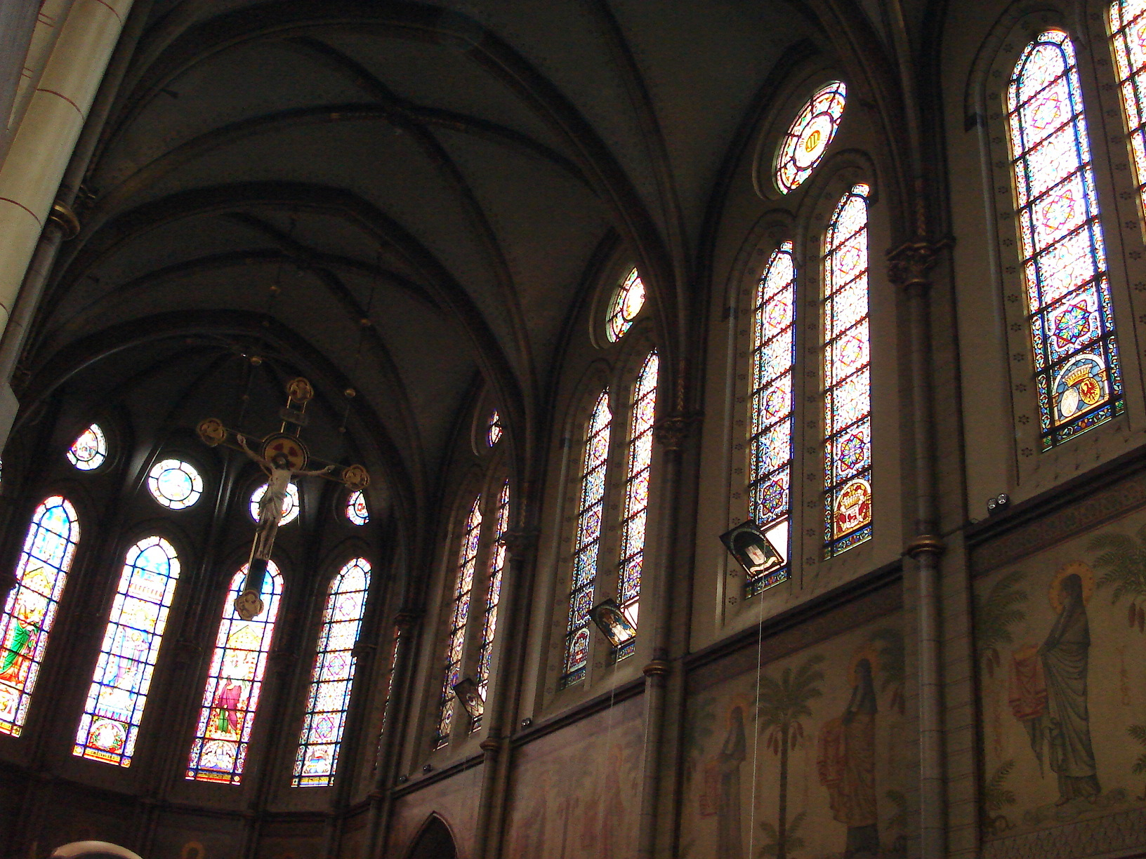 Heilig-Hartbasiliek, Berchem (Antwerpen). N.o.v. Jules Bilmeyer.